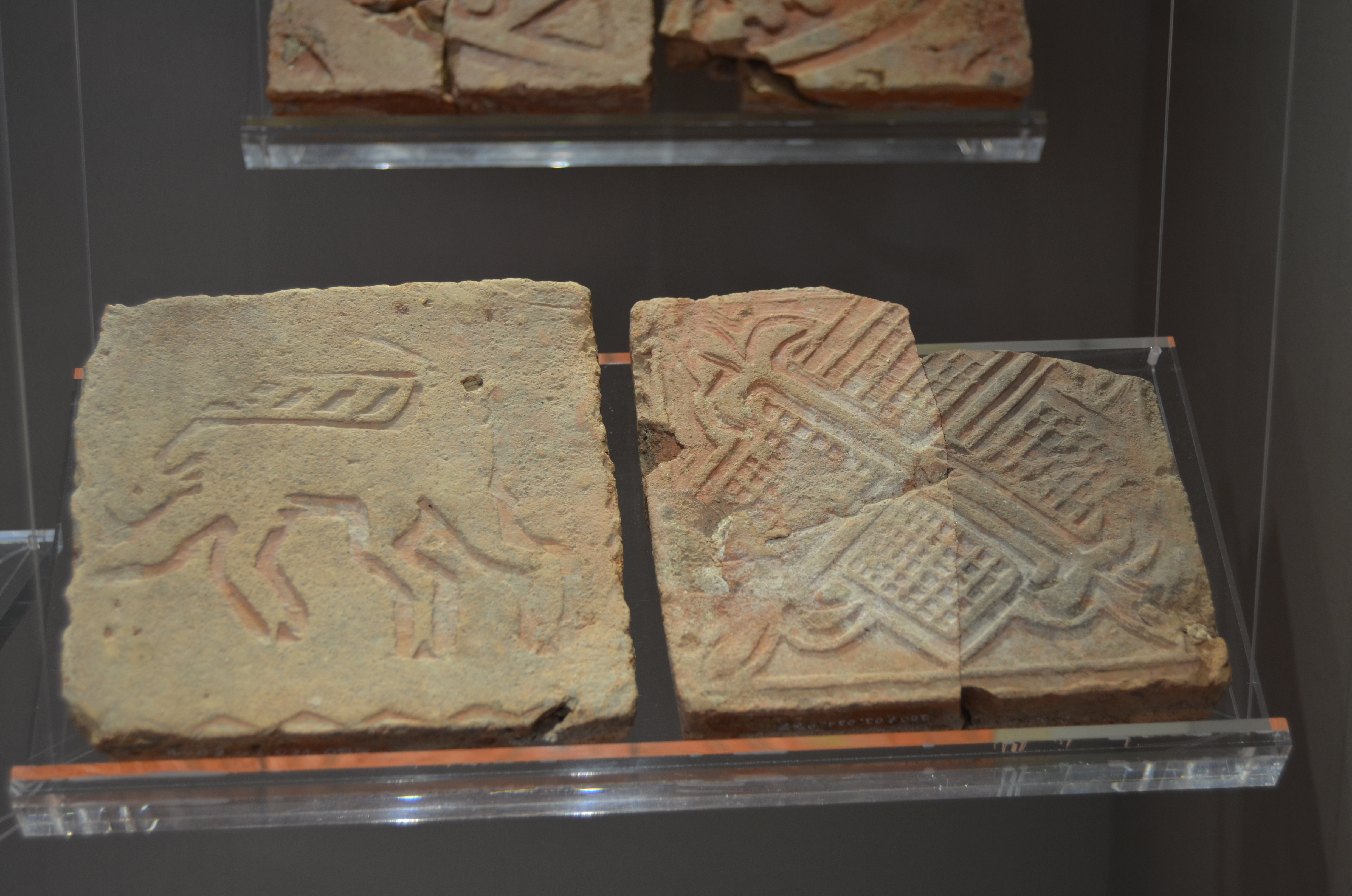 Fliesen